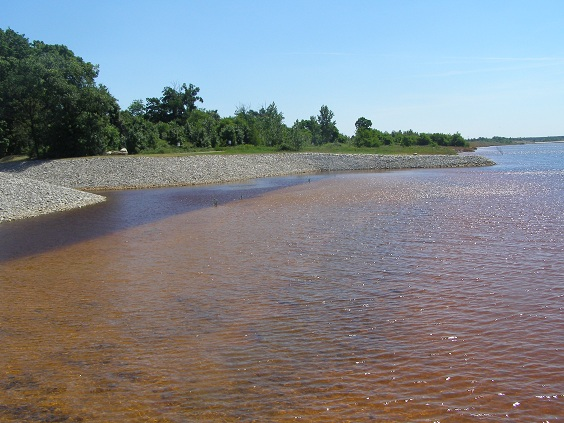 Hafeneinfahrt